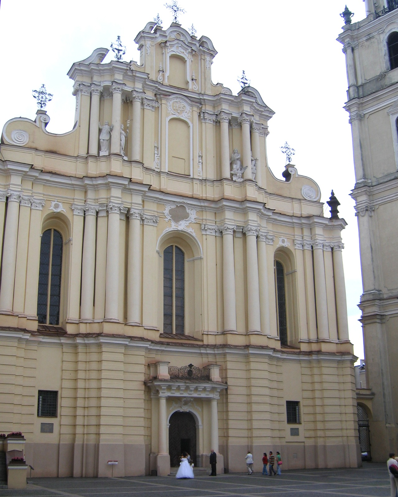 Autoriaus nuotrauka. 2006.07.29. Šv. Jonų bažnyčia, VU